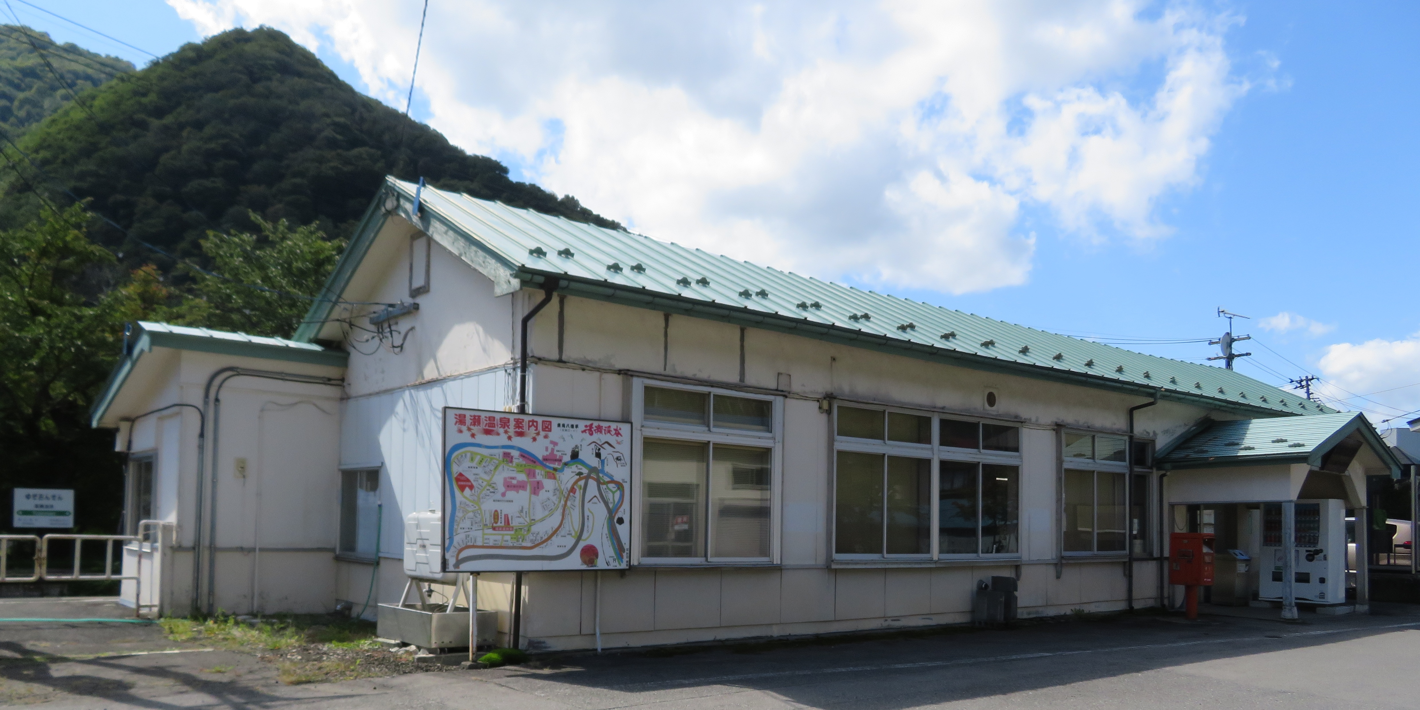 JR花輪線 湯瀬温泉駅：秋田県鹿角市 Canon PowerShot SX720 HS